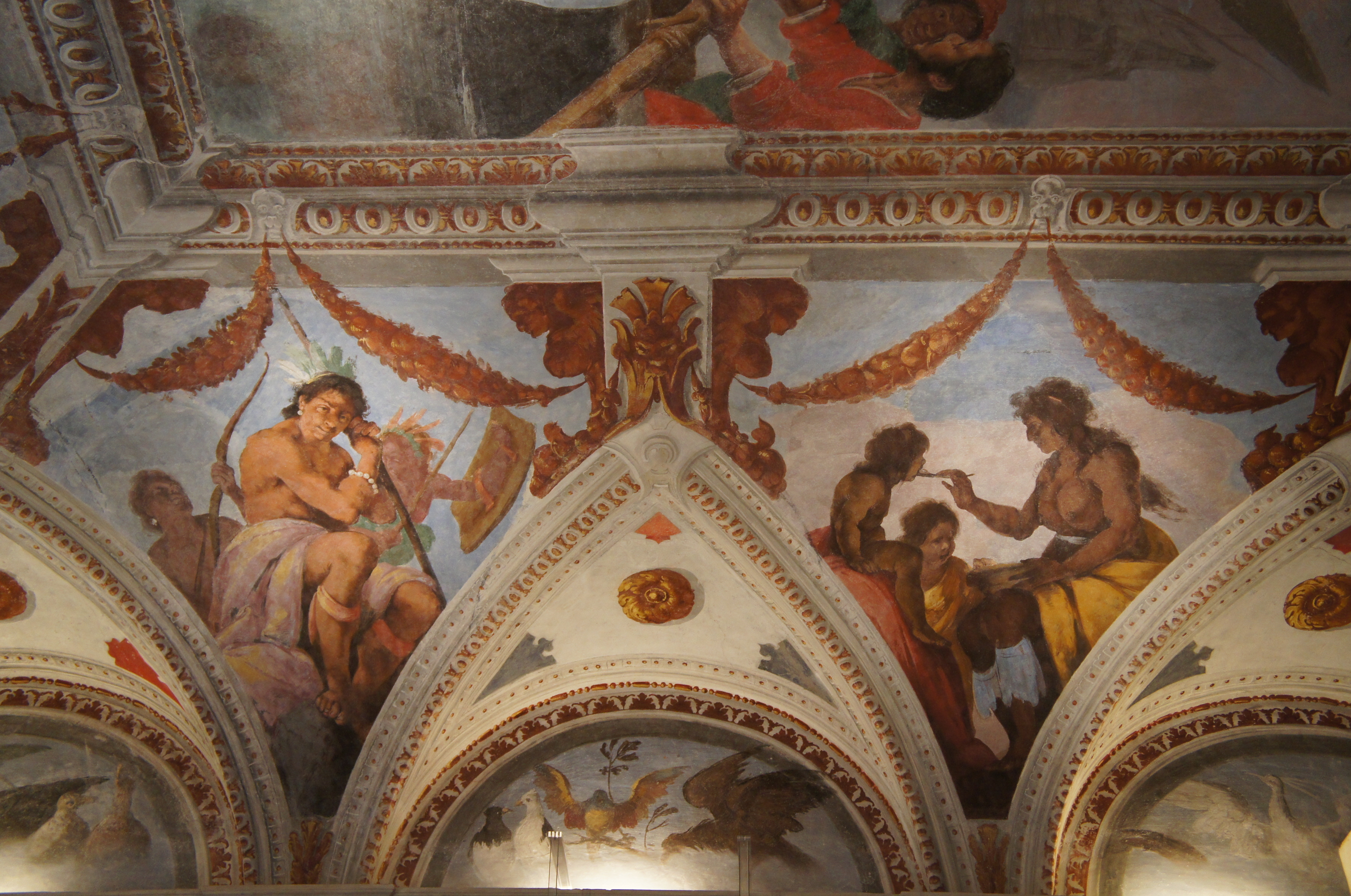 Palazzo Podestà, Genova